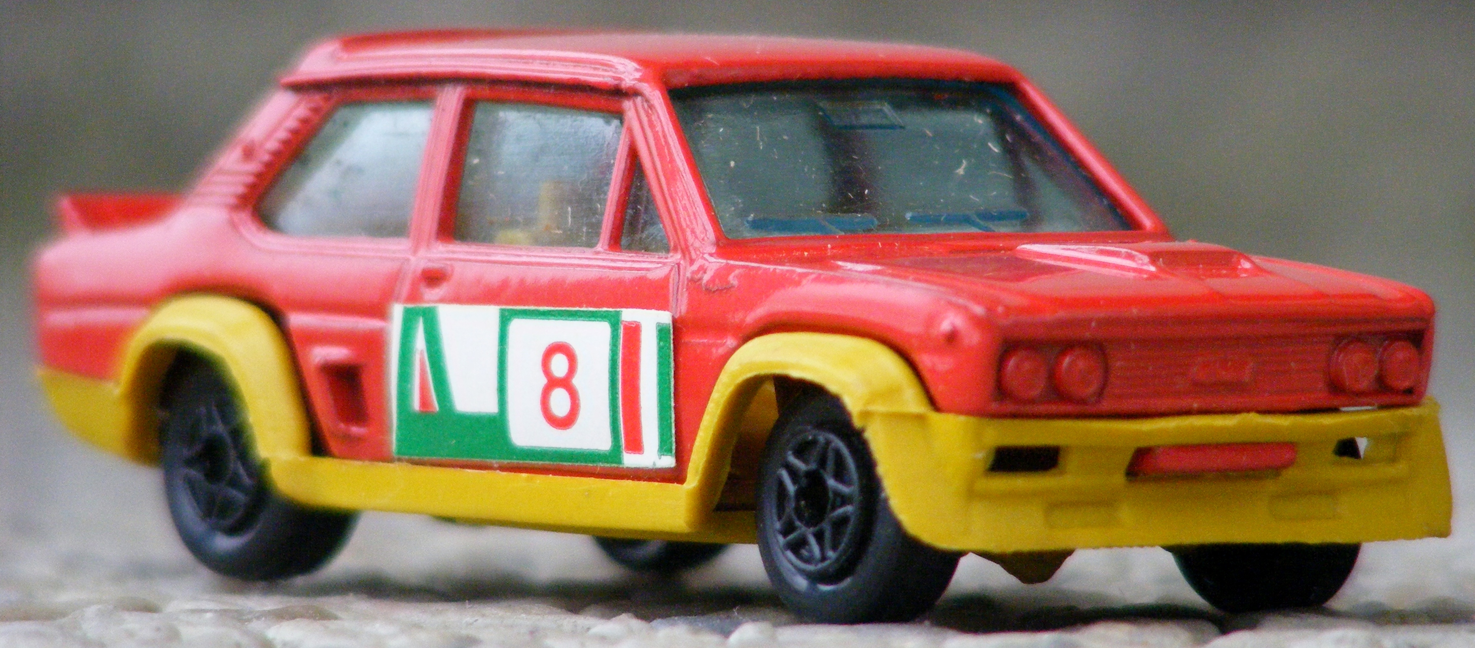 Mercury modelauto van een Fiat 131 Abarth